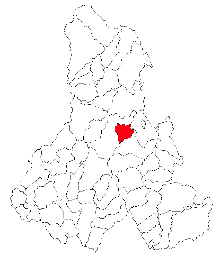 Categorie:Hărţi ale judeţului Harghita Licensing Sursă ro::Imagine:Harta_jud_Harghita.png